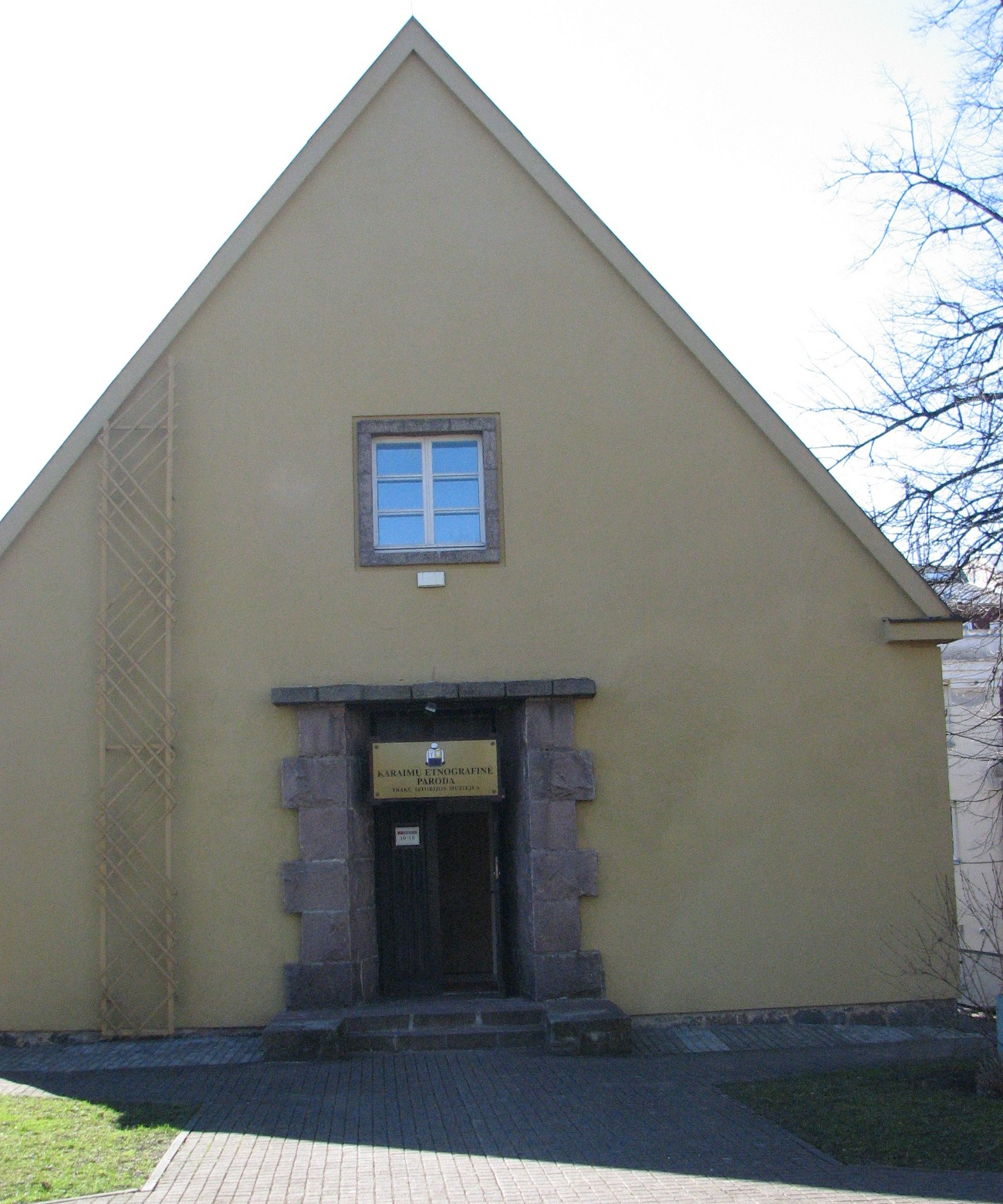 Autoriaus nuotrauka, 2007.03.24. Trakų muziejaus karaimų parodos ekspozicija, Trakai, Karaimų g. 22. Nuotrauka gali būti platinama pagal GFDL licenciją.